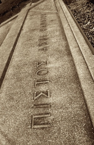 John G. Machens Ruhestätte auf dem Greenmount Friedhof in Baltimore